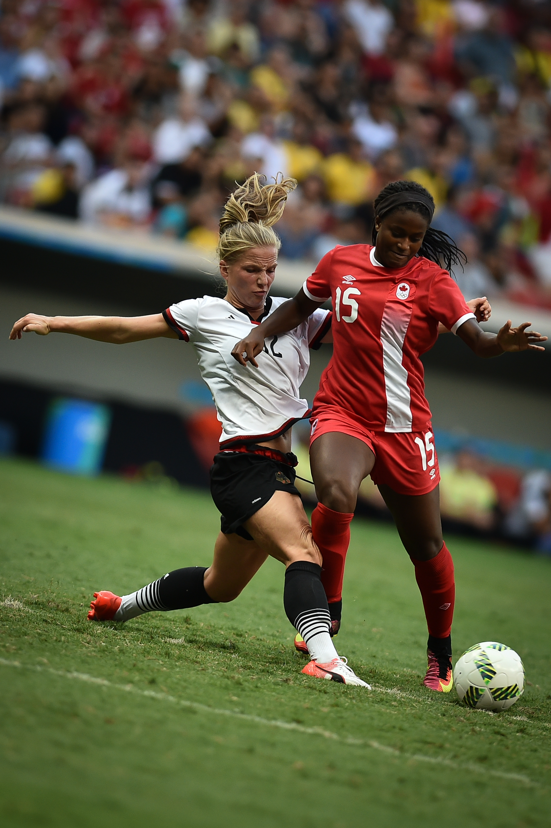 Estádio Nacional de Brasília Mané Garrincha, Brasília, DF, Brasil, 9/8/2016 Foto: Andre Borges/Agência Brasília Alemanha e Canadá jogam nesta terça-feira (9), no Estádio Mané Garrincha, pelo grupo F do futebol feminino nas Olimpíadas 2016.